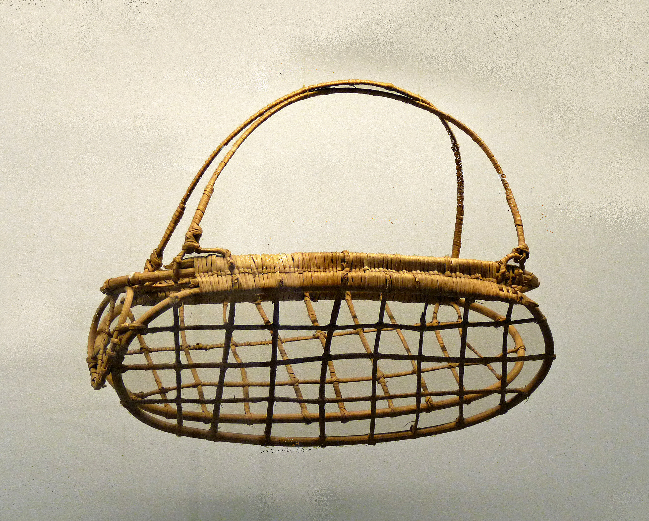 Barambo (RDC) : panier à poules. Musée royal de l'Afrique centrale